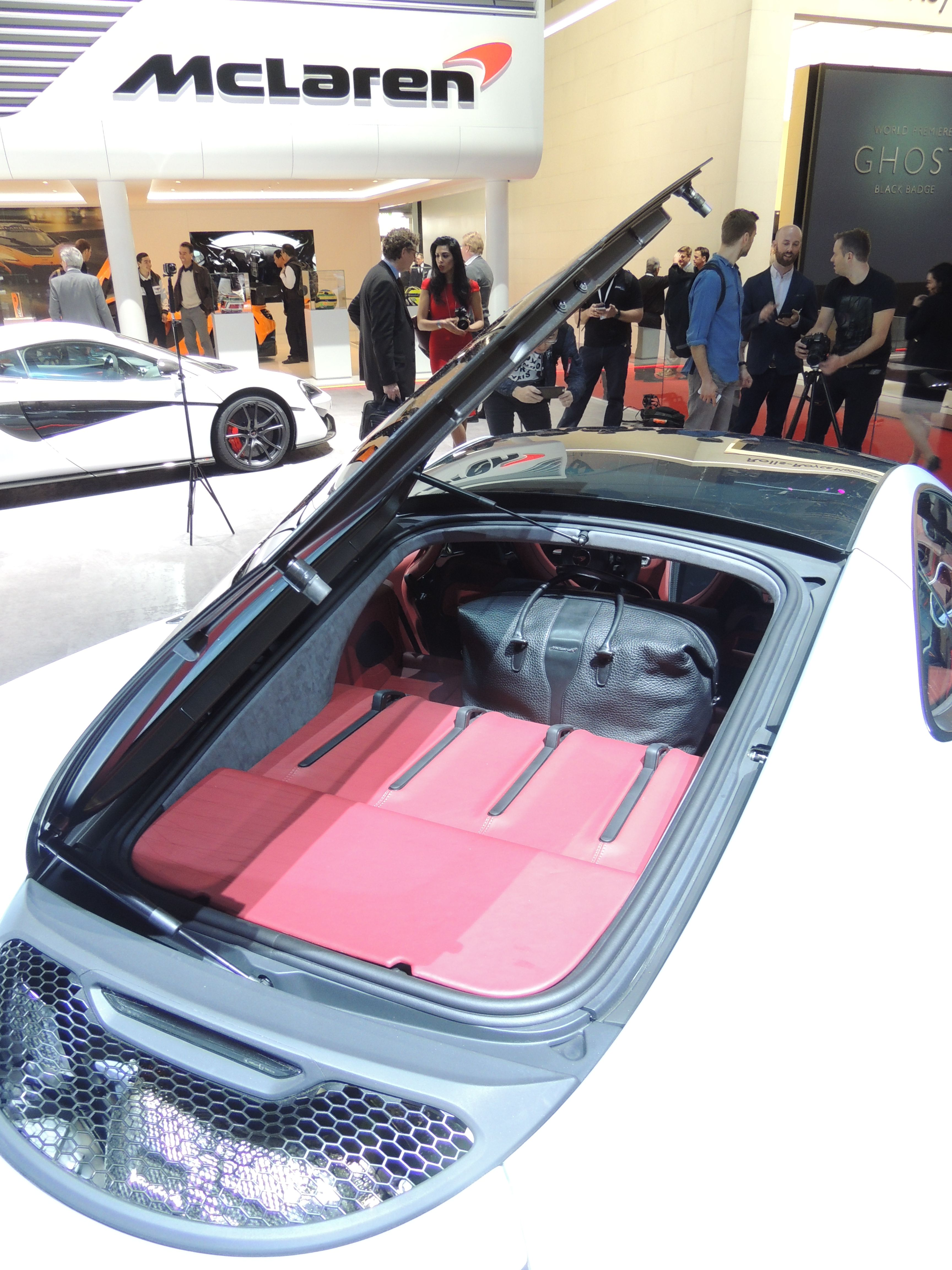 McLaren 570GT back, salon de Genève 2016